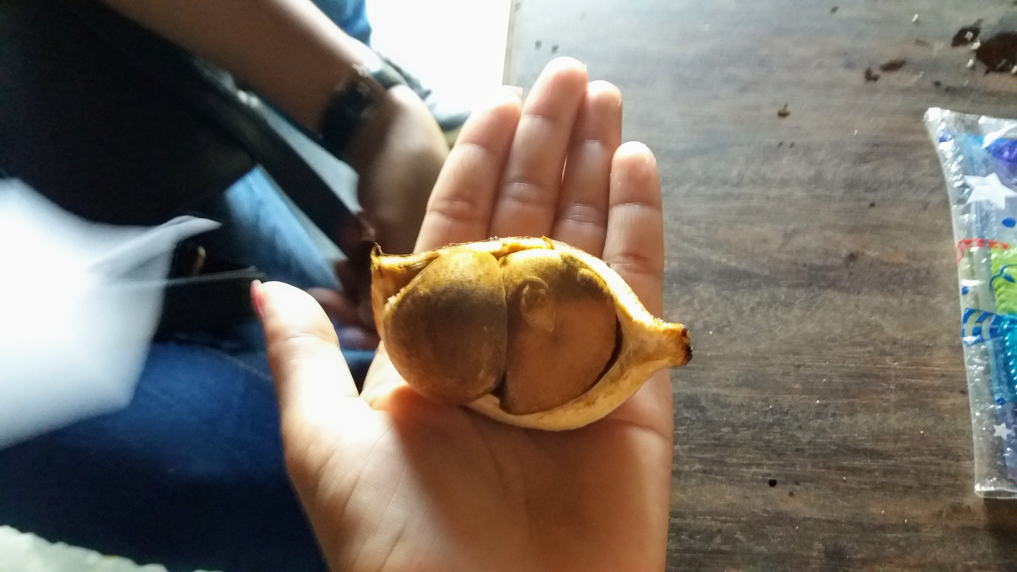 A andiroba-suruba recebeu esse nome dos indígenas Tupis. É popularmente conhecida na região Amazônica pela riqueza medicinal do óleo extraído de suas sementes. This photo has been taken in the country: Brazil